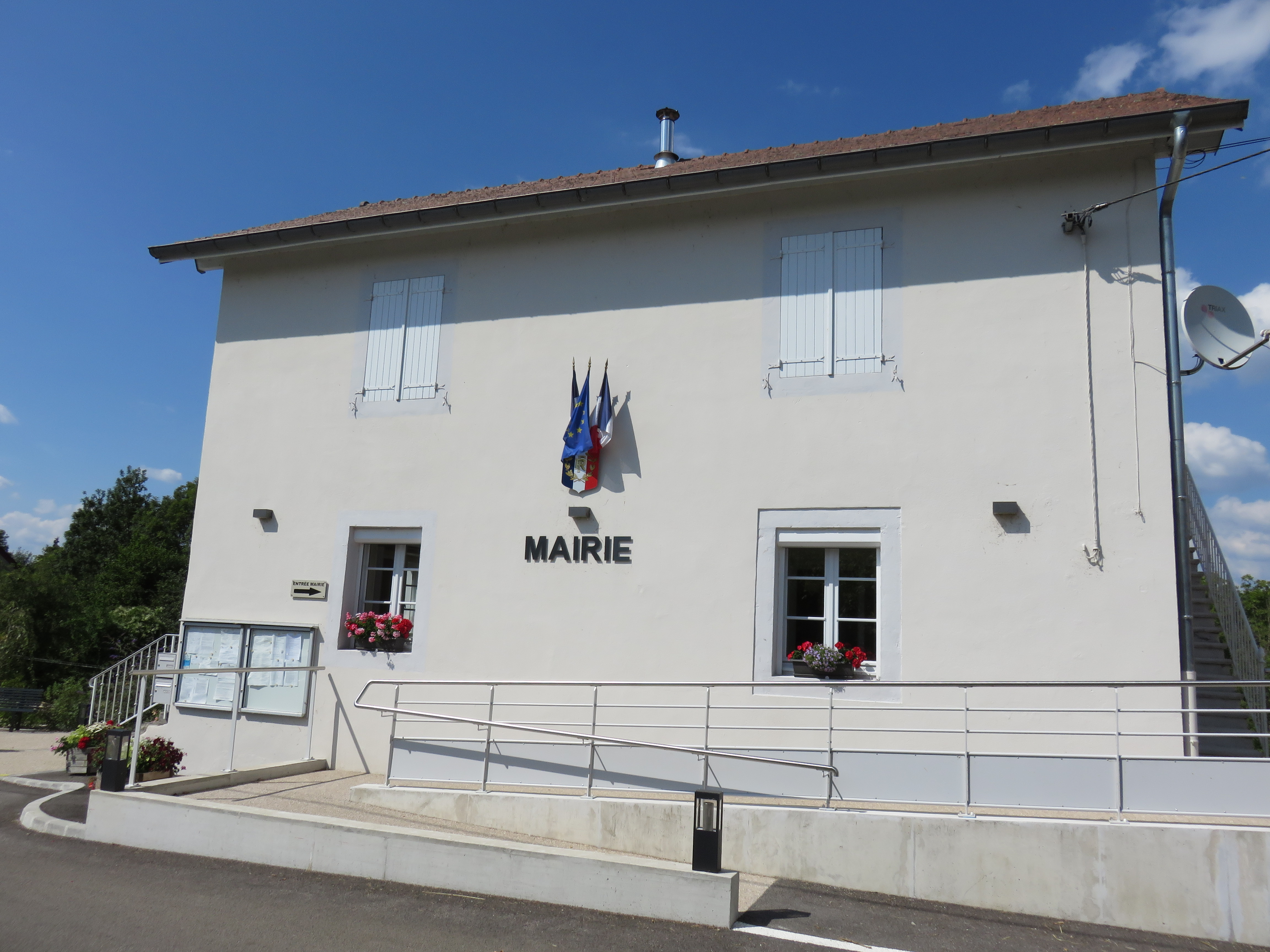 Boissia (Jura, France).